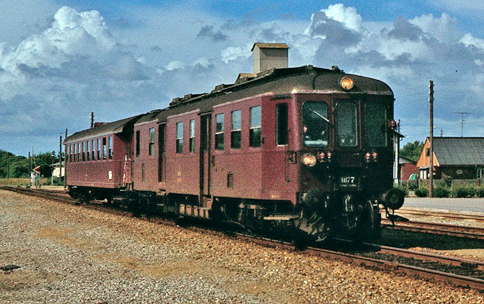 MO 1877